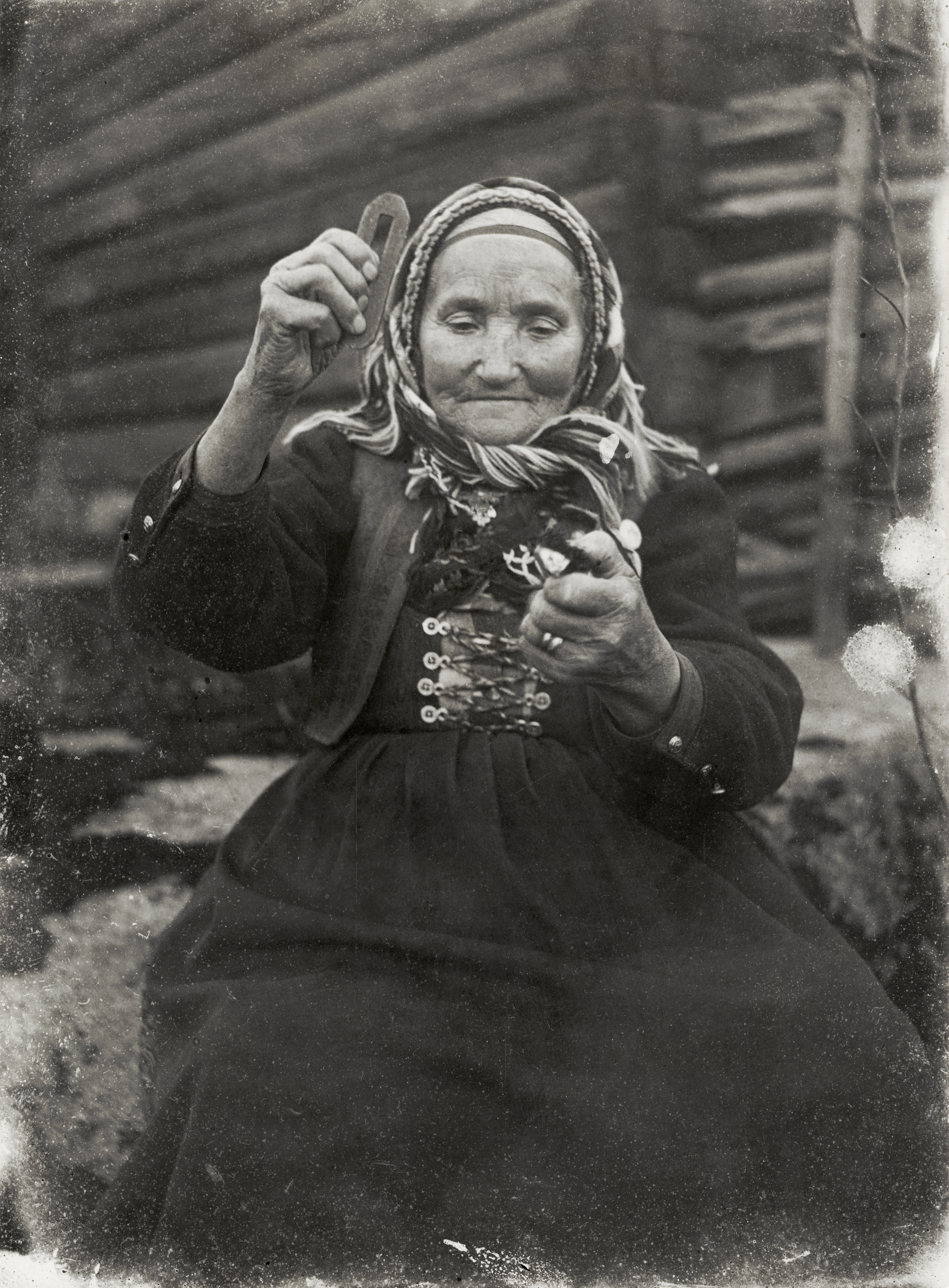 Eldslagning. Bullermor Stina Persdotter slår gnistor med ett ovalformigt stål mot en flintbit, som hon håller fasttryckt mellan motsatta handens tumme och pekfinger. Gangef sn, Dalarna.